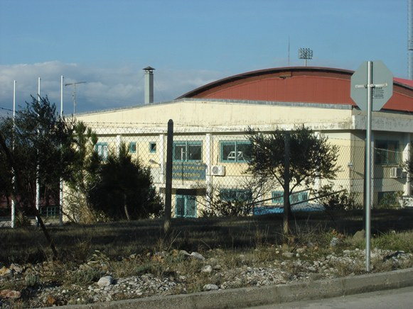 Palai de Spor in university Patras Greece Παλαί ντε σπορ Πανεπιστημίου Πάτρας.